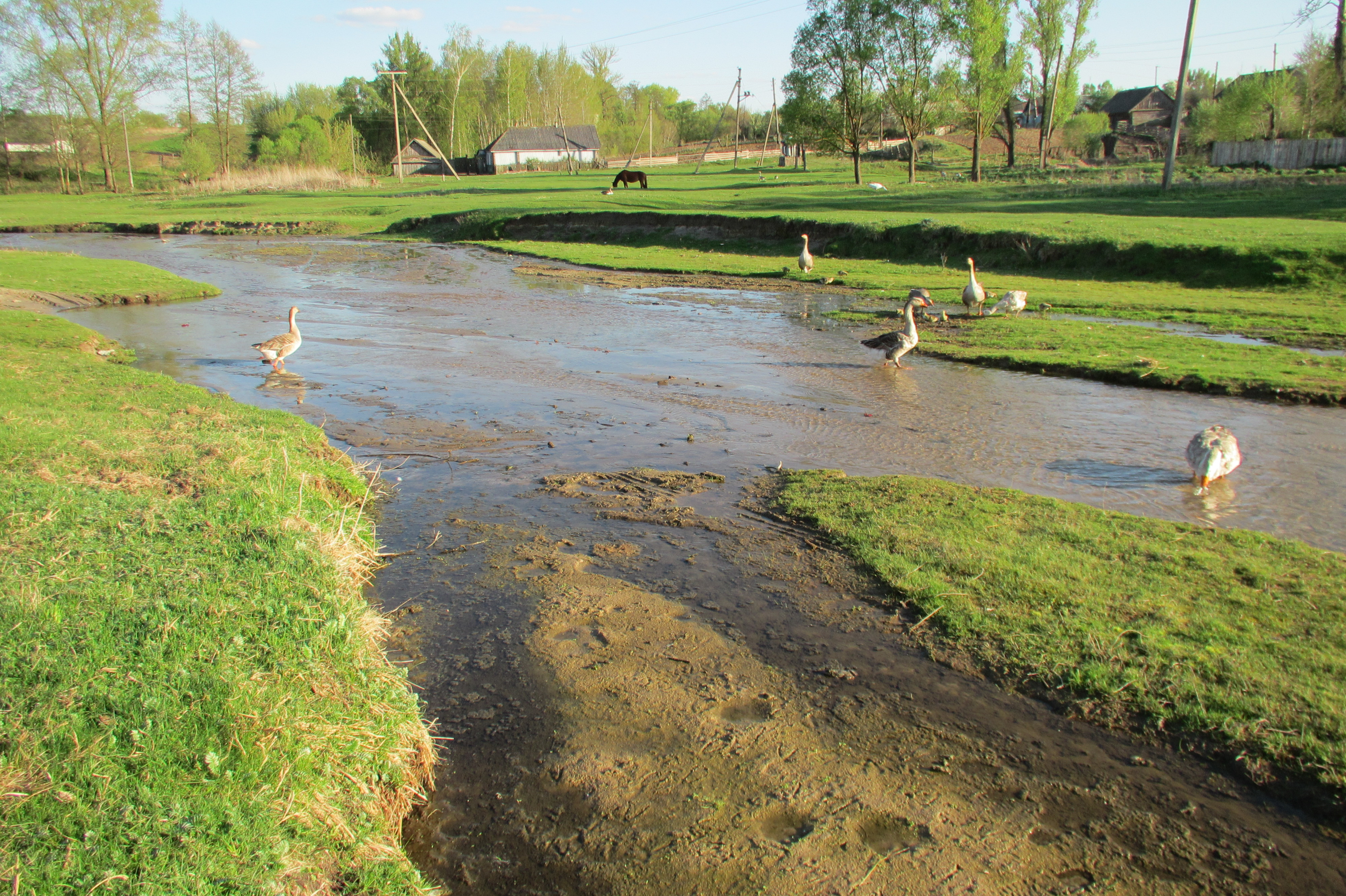 Гремячка по селу.